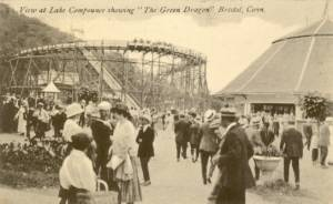 ancienne attraction "Green Dragon" du parc américain "Lake Compounce".